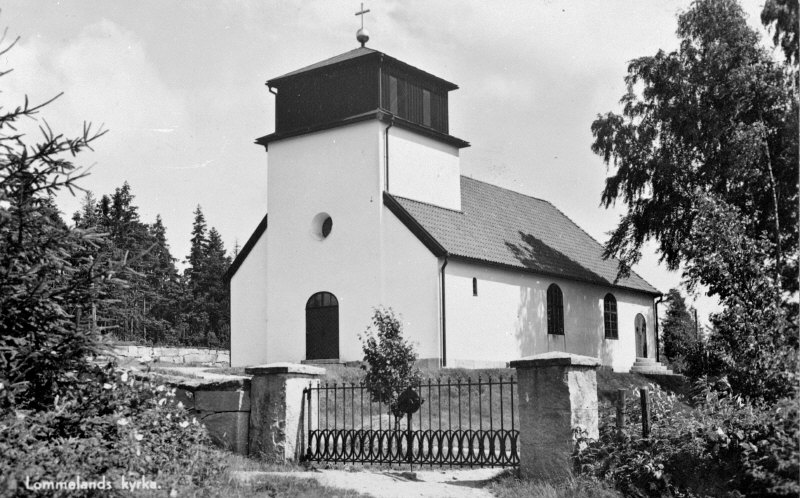 Kyrkan från sydväst. Kategori: (01) ExteriörerKyrkan från sydväst.